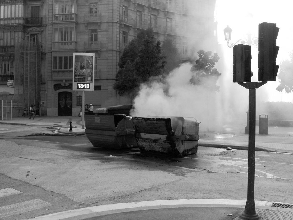 Zabor kontenedeoreak erreta Donostiako Prim kalean.